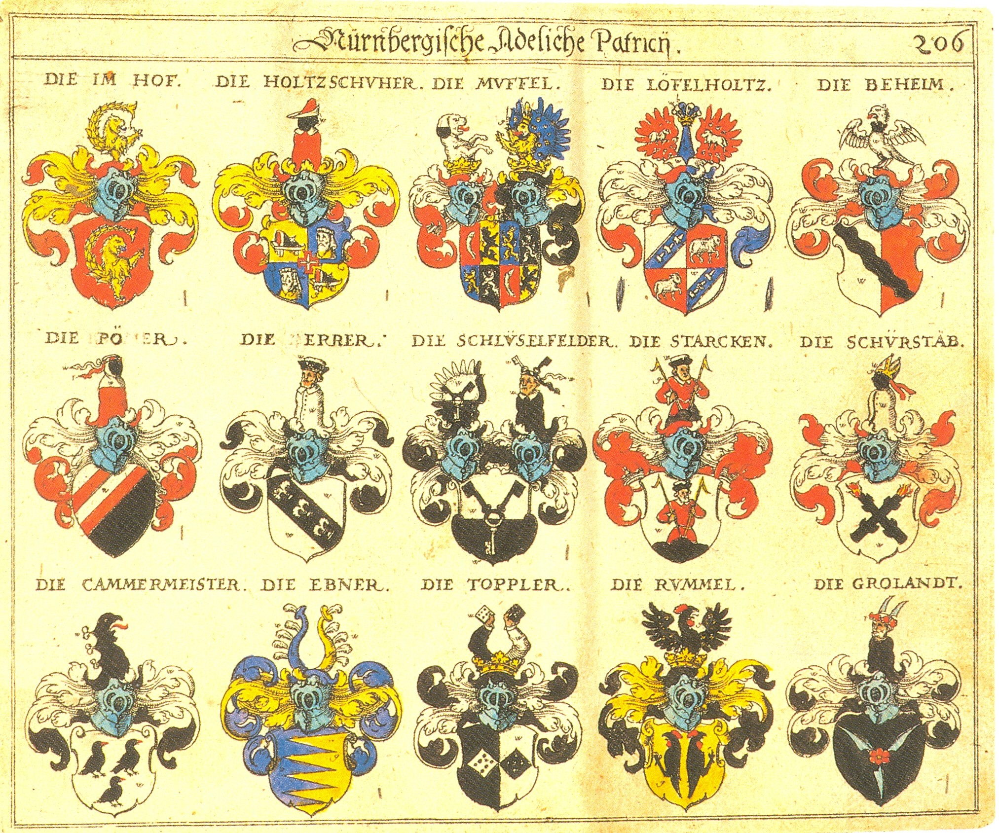 Johann Siebmacher: New Wappenbuch eingescannt aus: Horst Appuhn (Hrsg.), Johann Siebmachers Wappenbuch. Die bibliophilen Taschenbücher 538, 2. verb. Aufl , Dortmund 1989 Patrizier und Adel Nürnberg Blatt 206